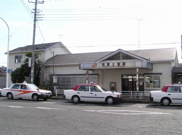 Nishi-Fujinomiya Station on Minobu Line